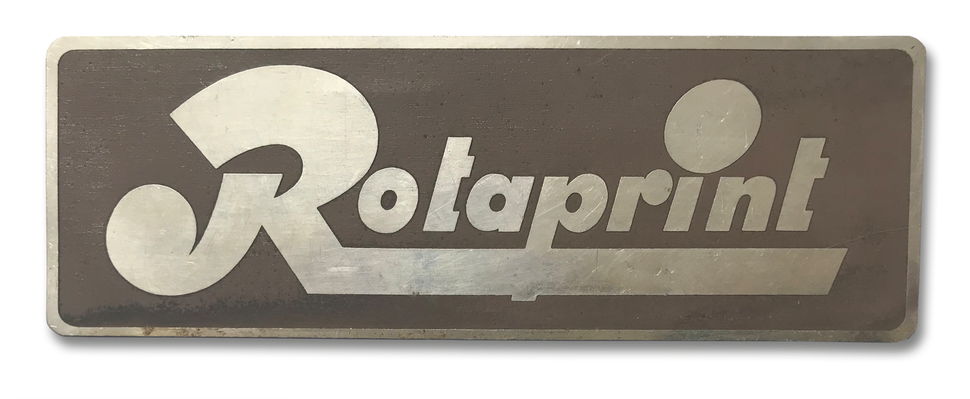 Rotaprint Firmenlogo einer A3-Offsetmaschine (Anfang der 198er Jahre).